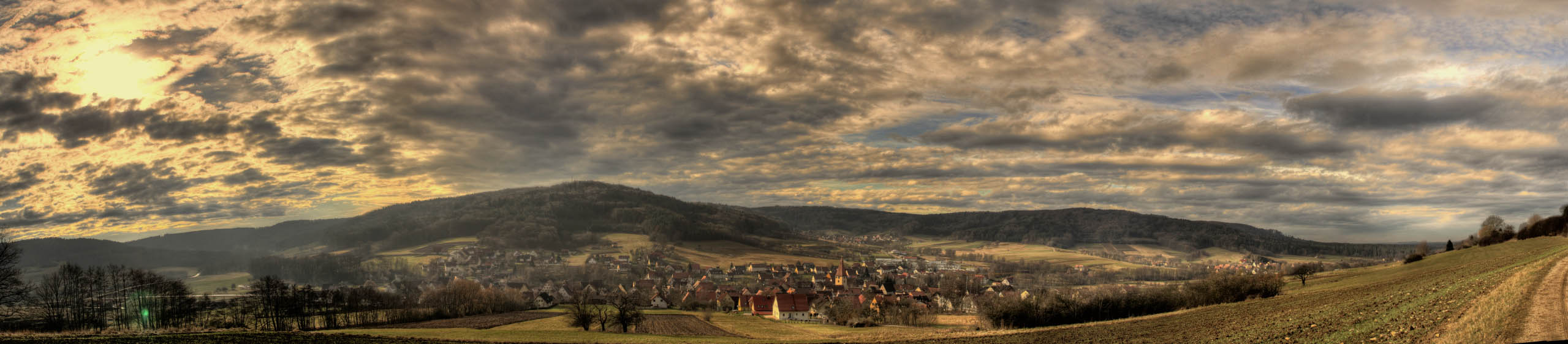 Panorama von Offenhausen, in Richtung Südwesten photographiert.